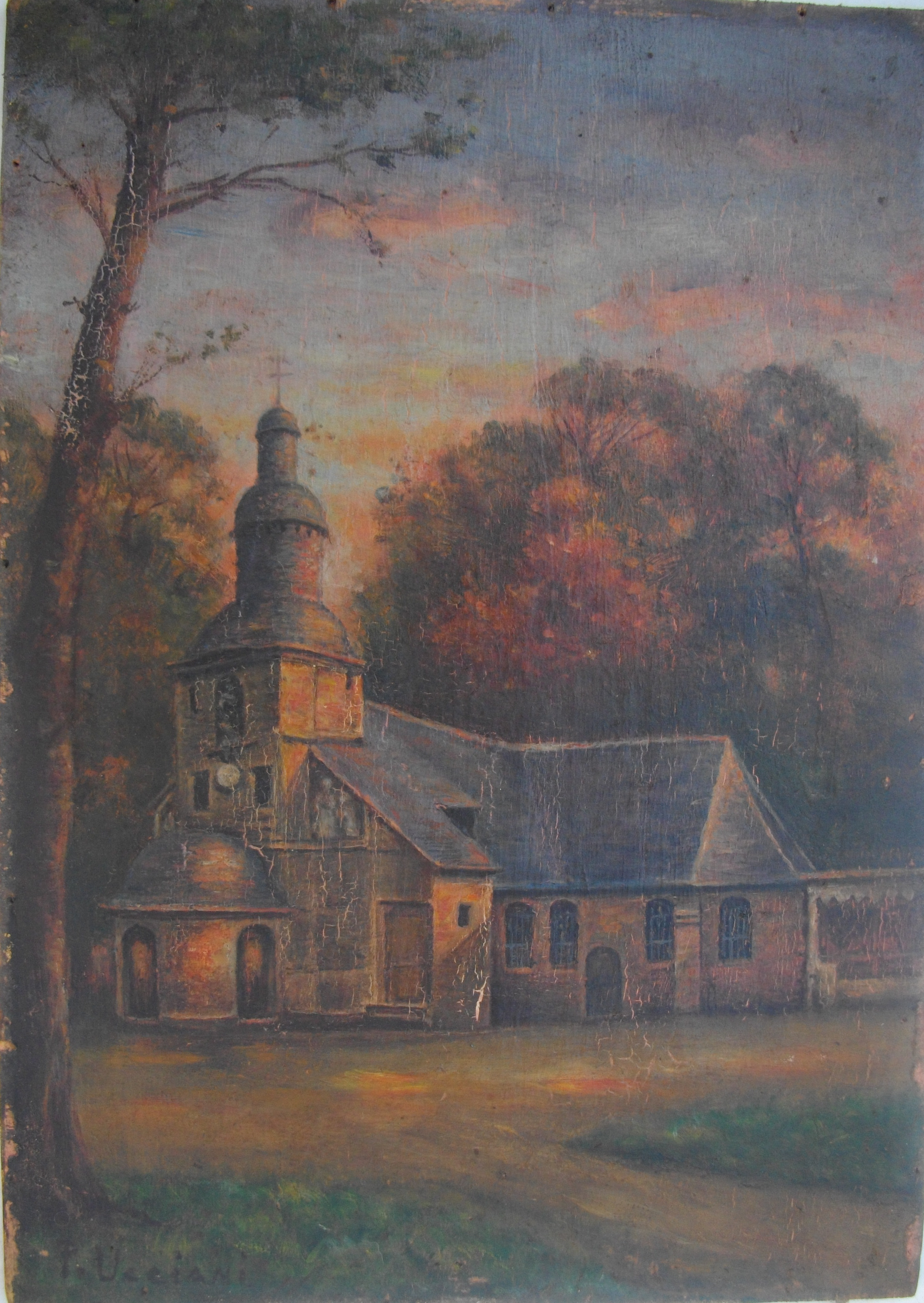 Pierre Ucciani, "Chapelle Notre-Dame-de-Grâce" Honfleur 1910, huile sur toile, Collection Ucciani.